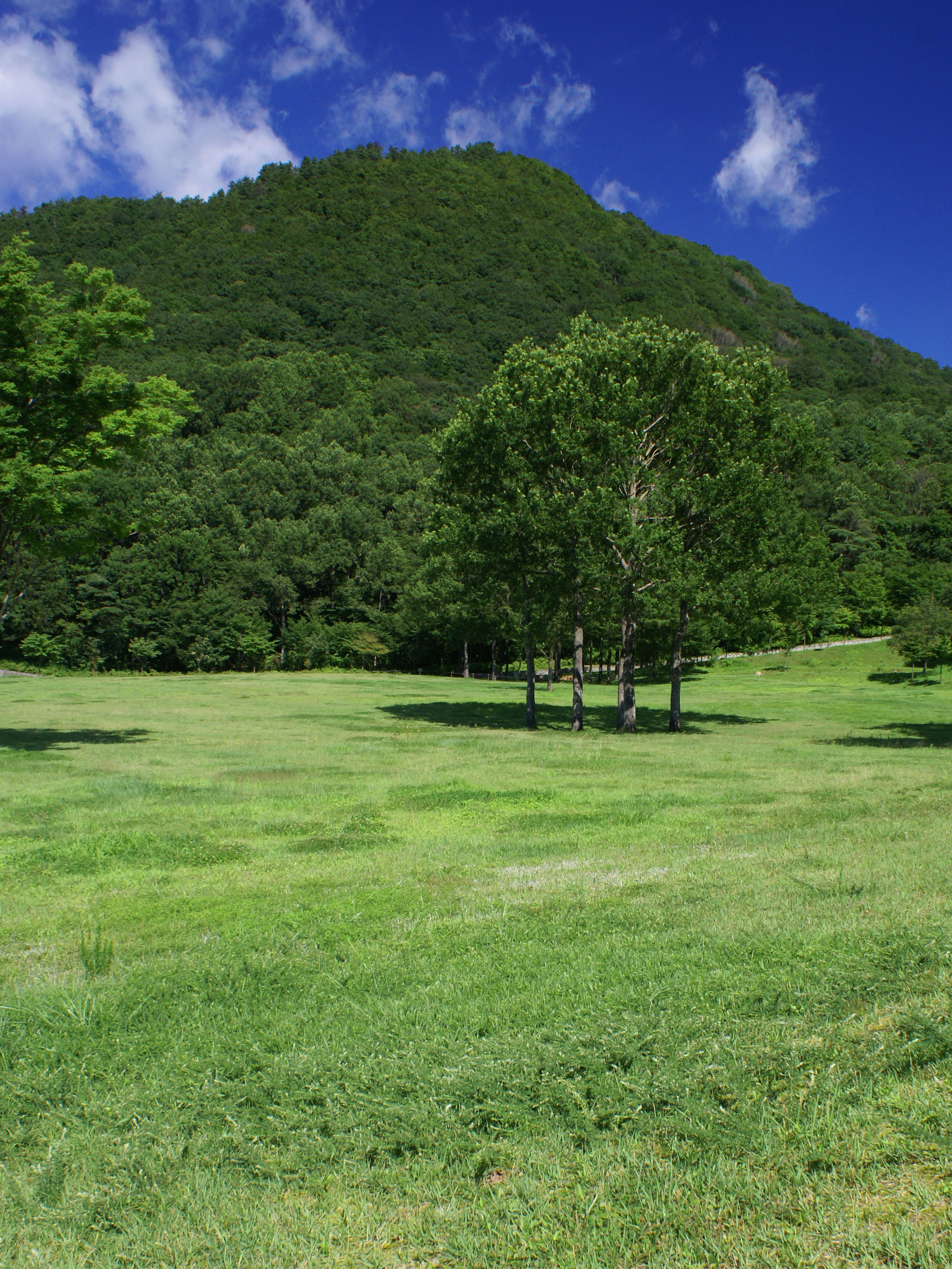 Mt.Torokawa in Kami, Hyogo, Japan